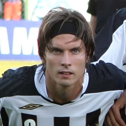 CAMPEONATO PAULISTA 2008 FUTEBOL ESPORTES SETÃOZINHO X SANTOS Time do Santos que iniciou a partida. - ESTÁDIO FREDERICO DALMAZO SERTÃOZINHO/SP BRASIL 01/03/2008 Foto: Junior Faria/GazetaPress código da foto